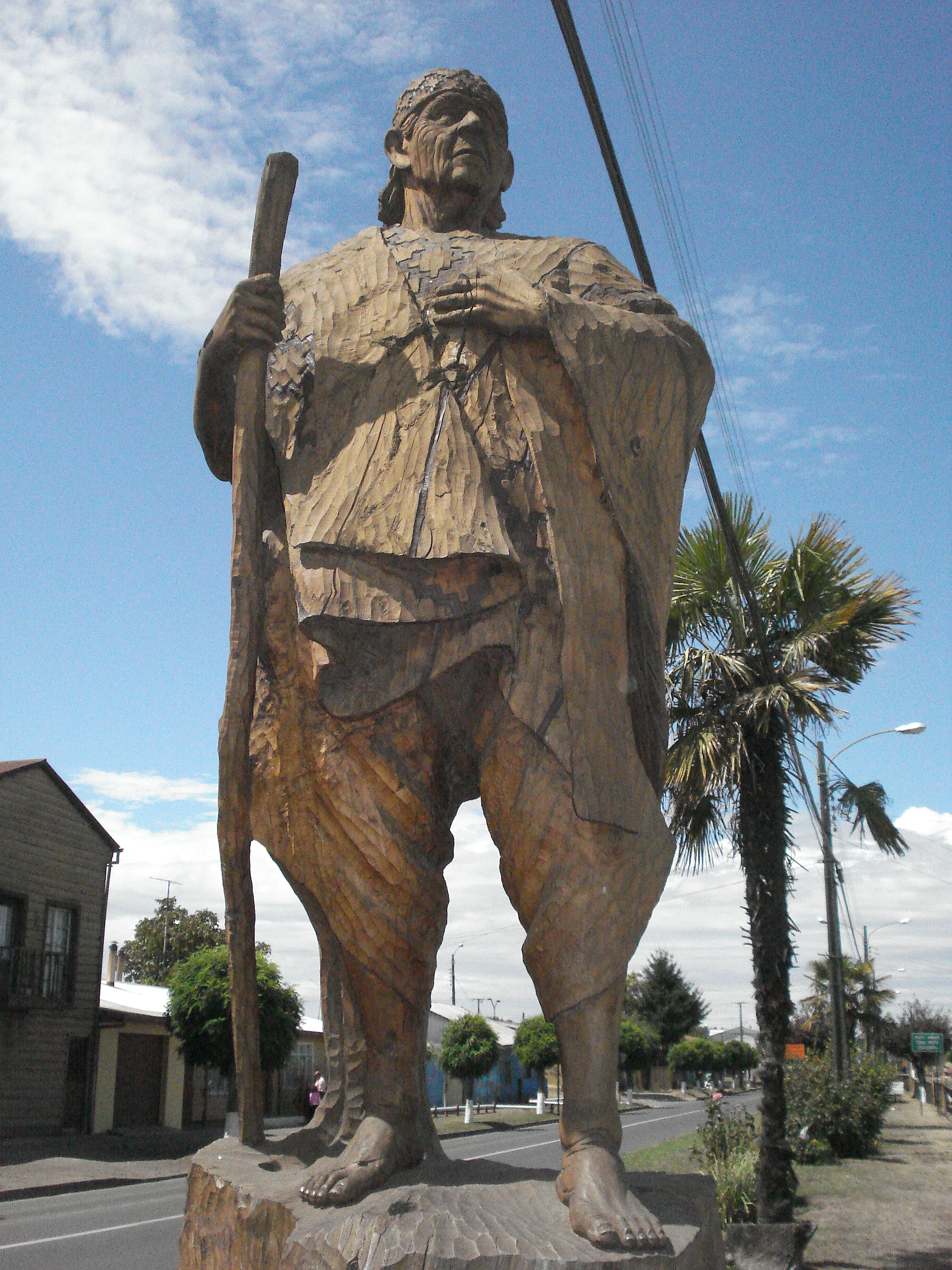 escultura del cacique Lorenzo Lemunao que según la historia oficial habría sido el propietario de la tierras del Traitraico que hoy dan vida a Nueva Imperial.